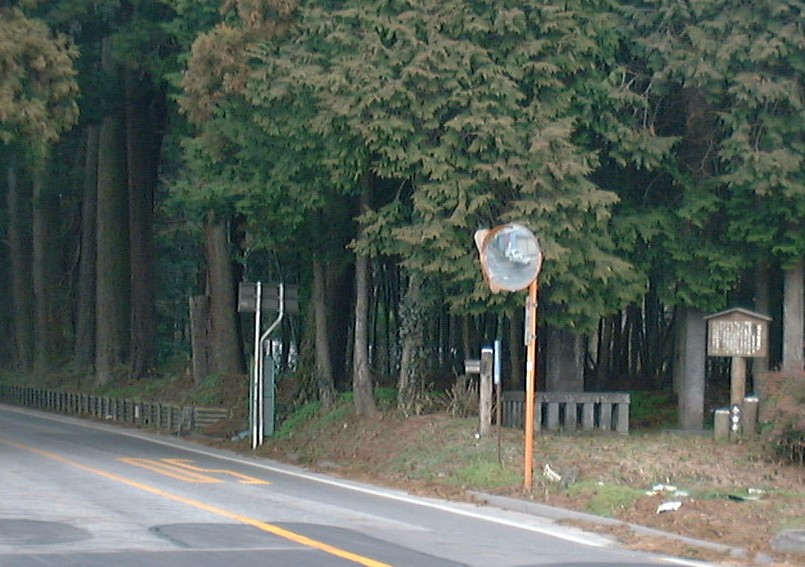 Vue de l'avenue de cèdre de Nikkō.